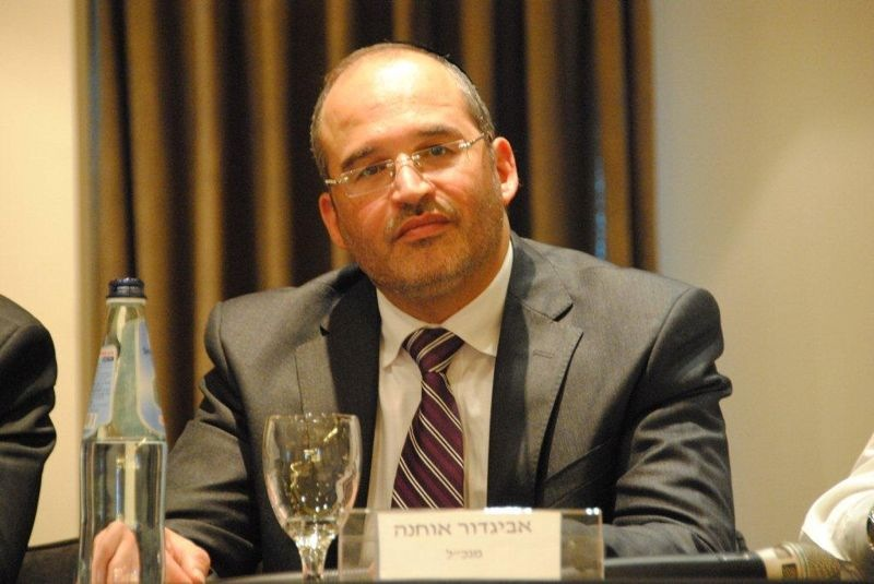 אביגדור אוחנה.